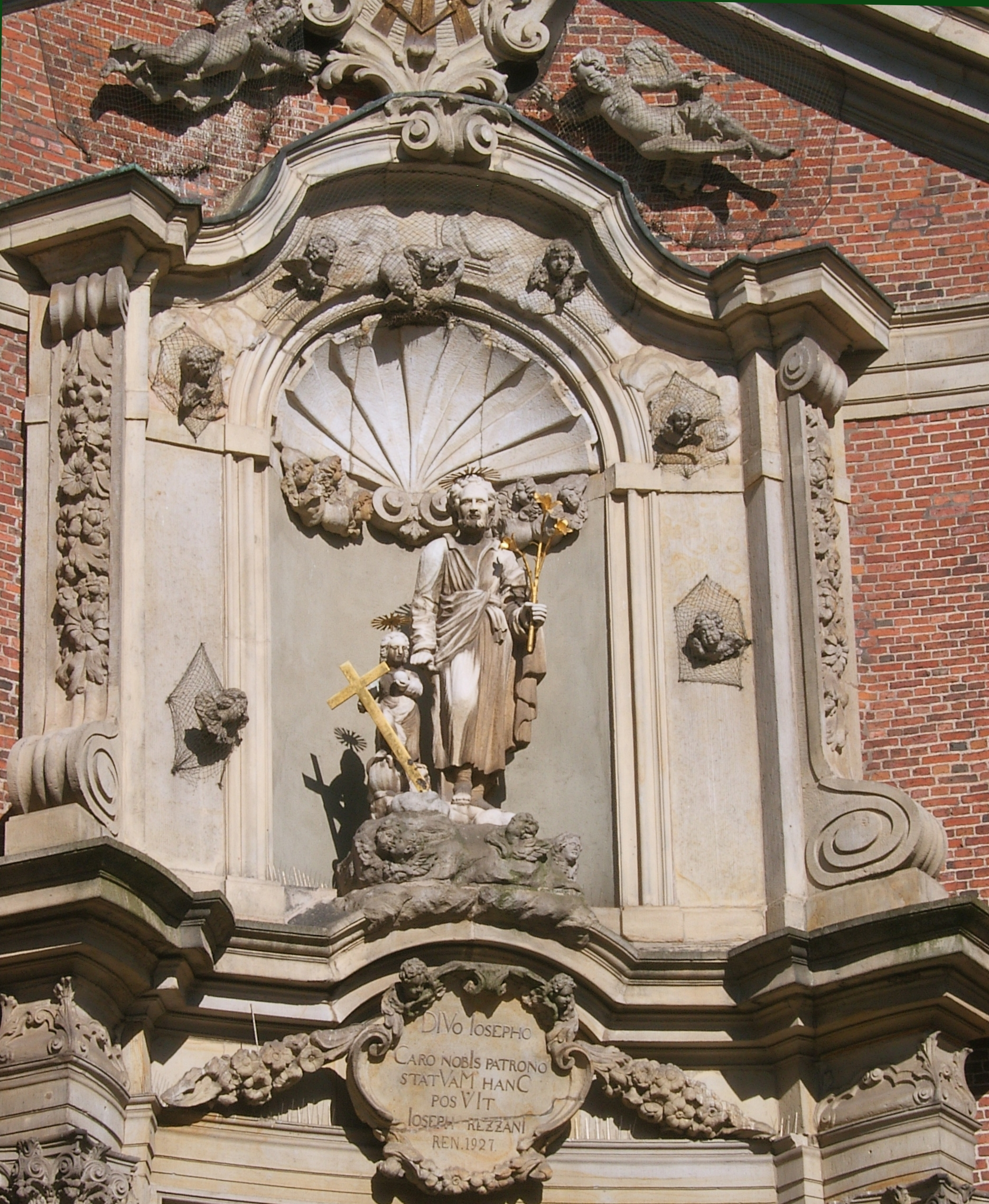 Bildbeschreibung: Hamburg, St.Pauli, St. Joseph Fotograf: selbst Datum: 19.07.2006